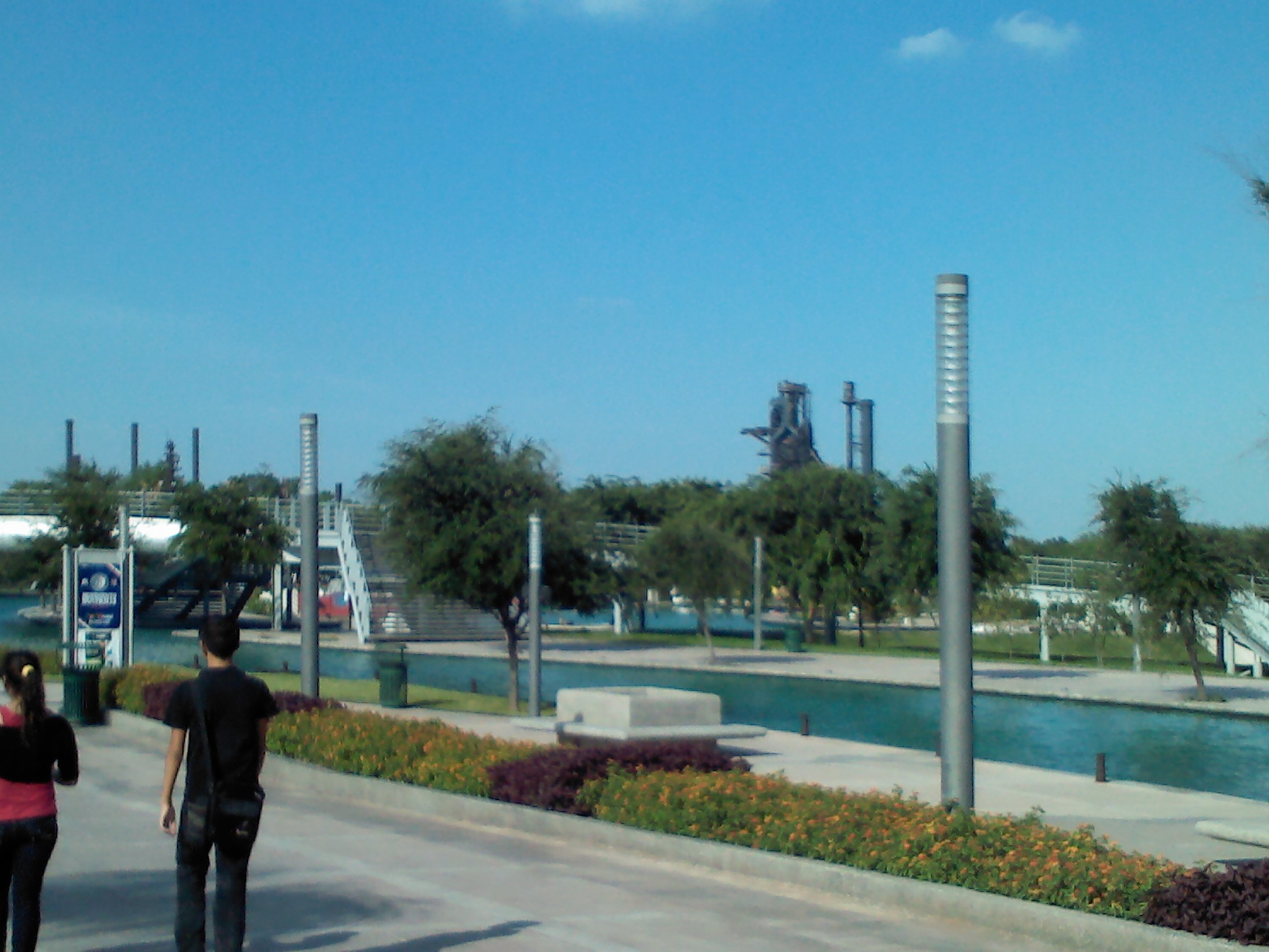 Vista a Santa Lucia